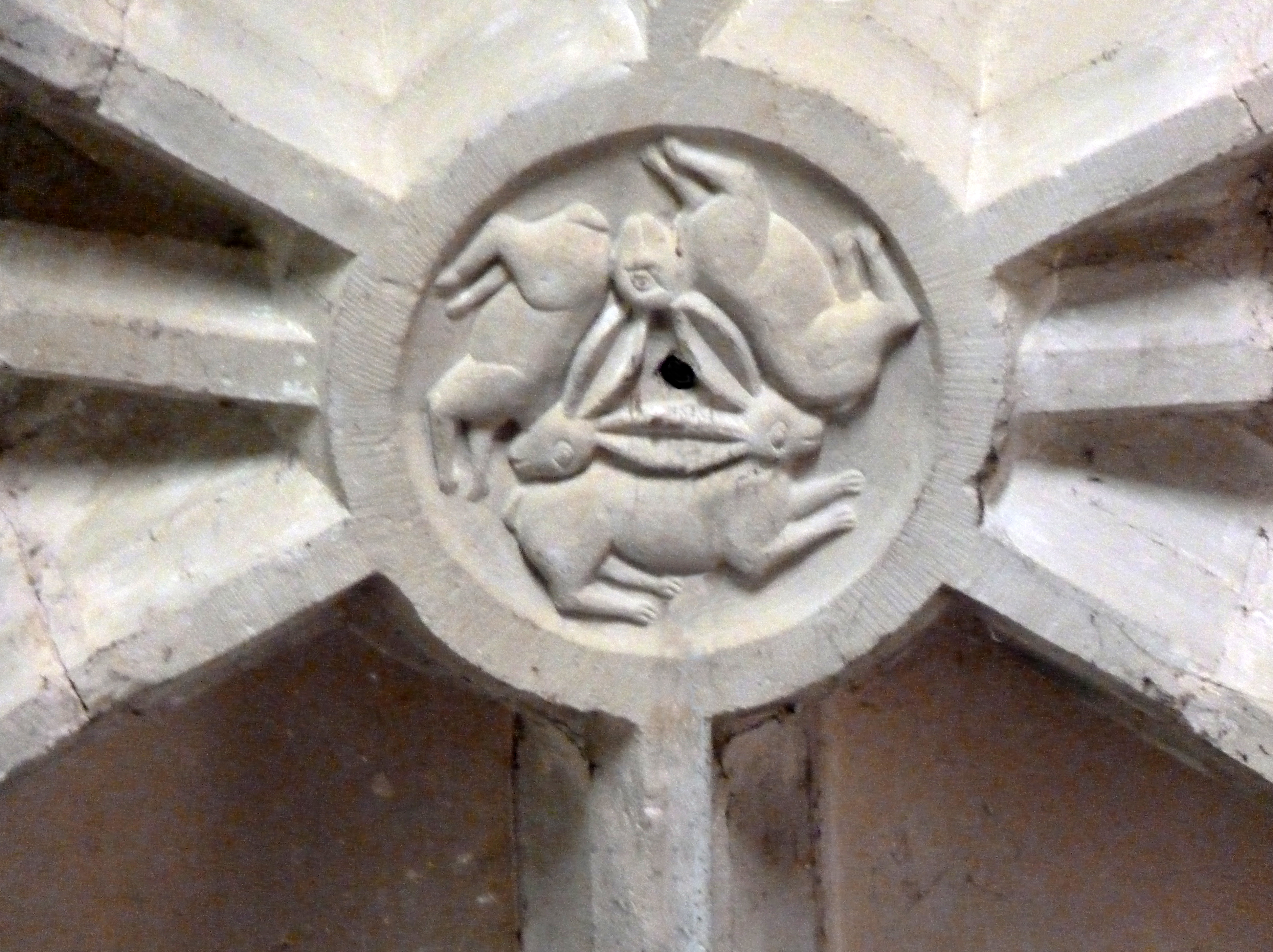 "Trois lièvres, trois oreilles, et pourtant chacun en a bien deux !" Fin XVe début XVIeS. Croisée d'ogive dans L'Eglise d'Anjeux (Haute-Saône)